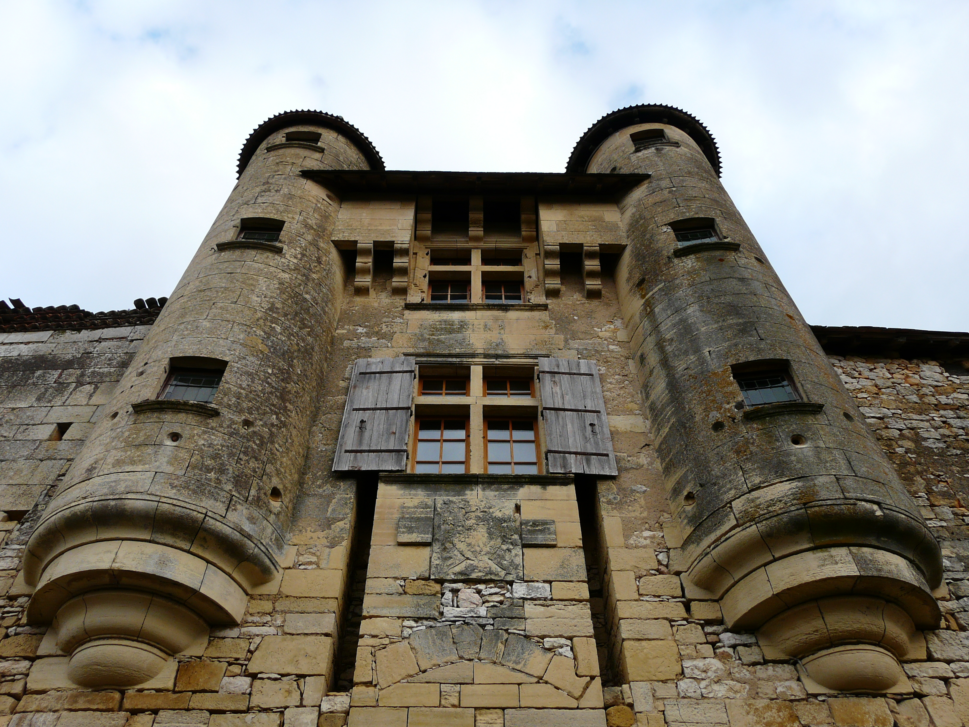 Les tourelles de la façade ouest du châtelet d'entrée, château d'Excideuil, Dordogne, France.